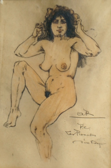 illustratie bij het gedicht 'Promesses d'un visage' van Charles Baudelaires 'Les Fleurs du mal'